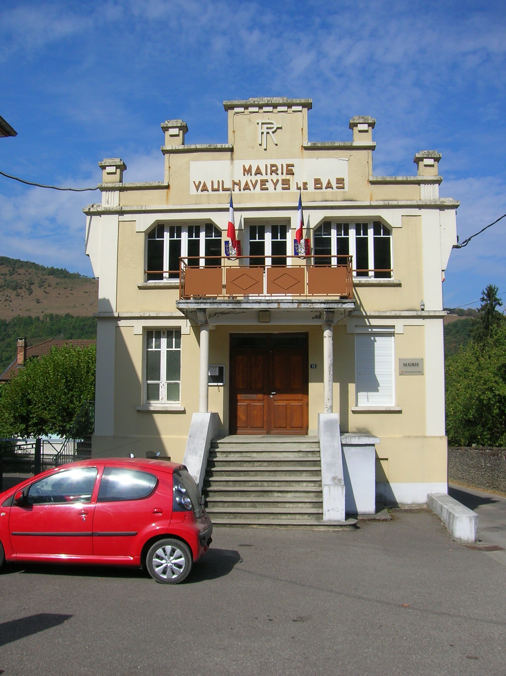 mairie de Vaulnaveys-le-Bas, Isère, AuRA, France.